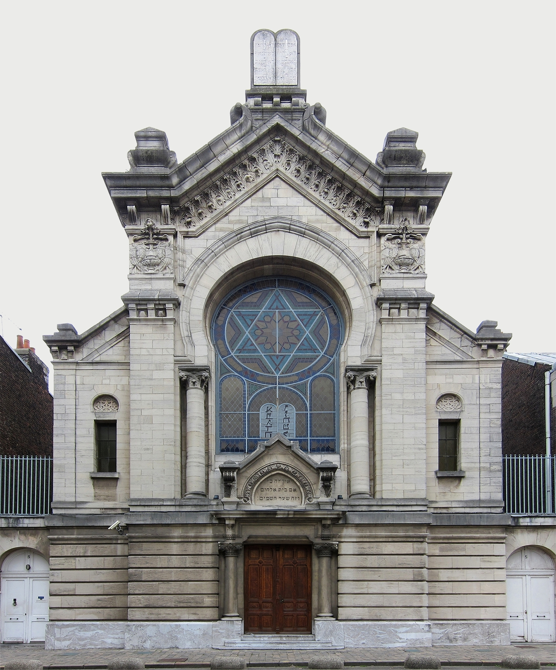 La synagogue de Lille.